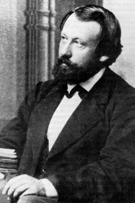 Wilhelm Dilthey zur Zeit seiner Verlobung (Vgl. Wilhelm Dilthey: Texte zur Kritik der historischen Vernunft. Vandenhoeck & Ruprecht, Göttingen 1983, Titelbild)